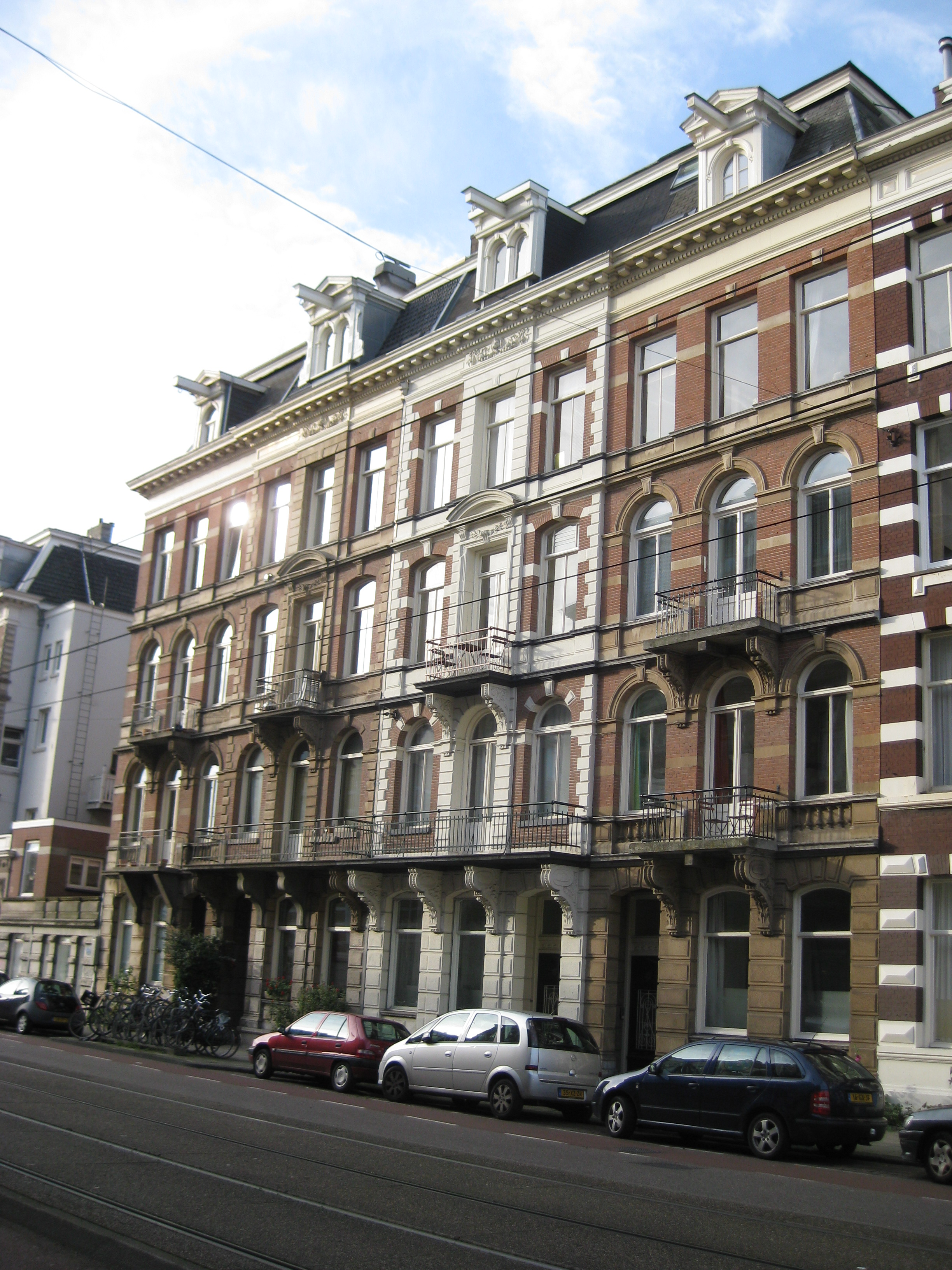 Ruyschstraat 3-9, Amsterdam. Samen met Ruyschstraat 4-10 de zogenaamde "Spiegelpanden" van architect Dolf van Gendt.